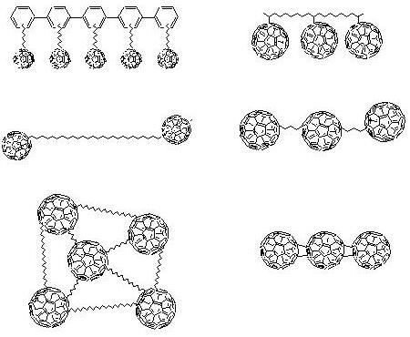 fig 15